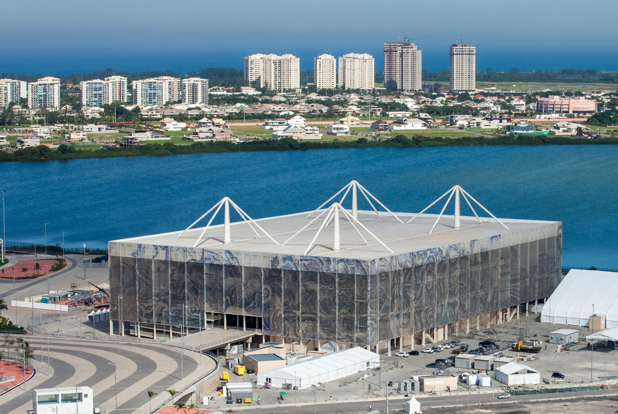 Centro de Esportes Aquáticos dos Jogos Olímpicos de 2016